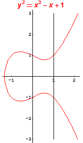 Príklad pre Bézoutou teorém